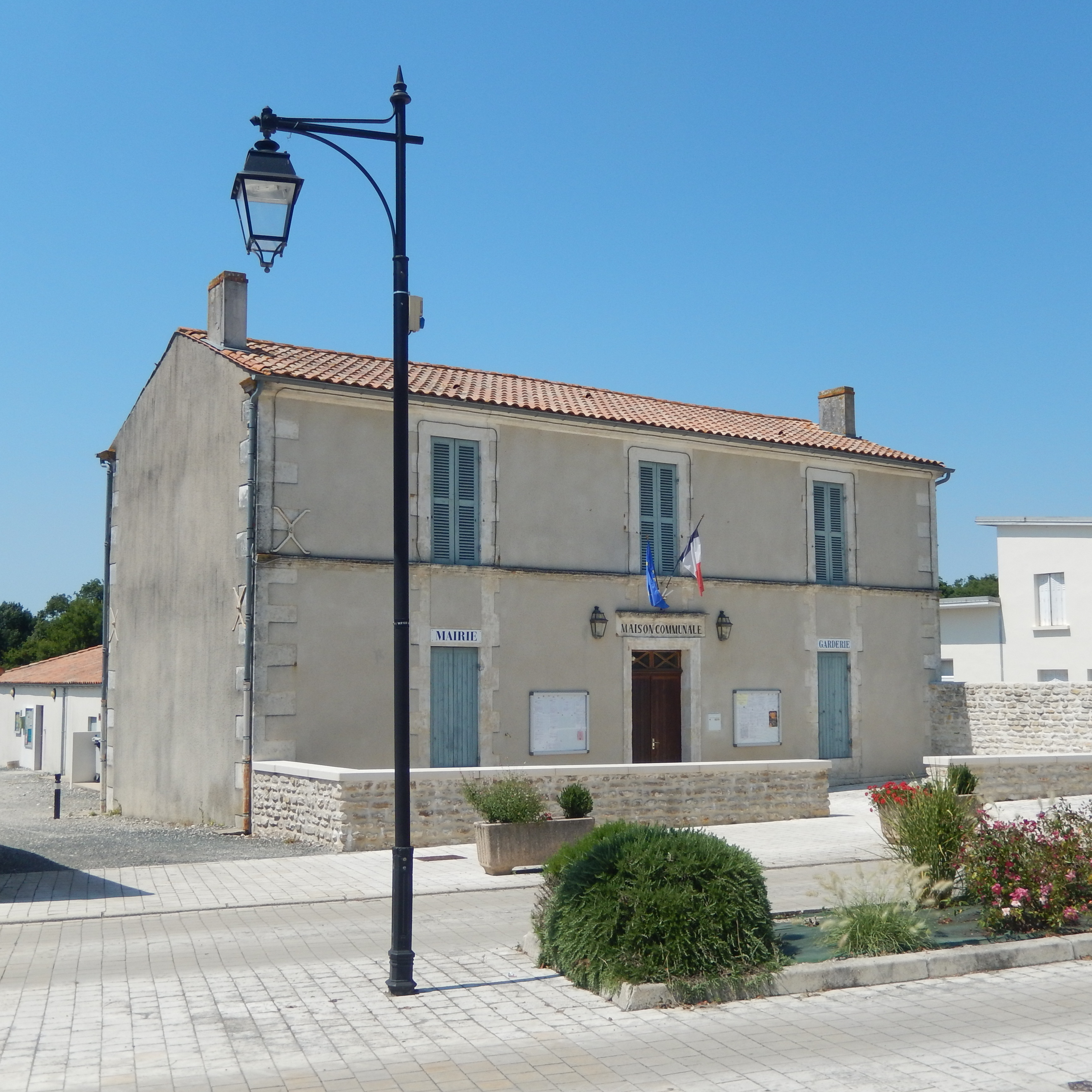 La « maison communale » de Moragne (Charente-Maritime, France) qui abrite notamment la mairie de la commune.